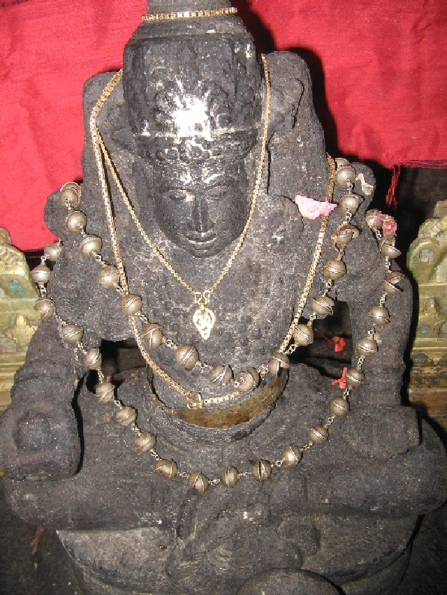 കരിക്കാട്ട് അയ്യപ്പന്റെ രൂപം. കയ്യിലെ താമരപ്പു, തുടയിൽ വച്ച ഇടതു കൈ